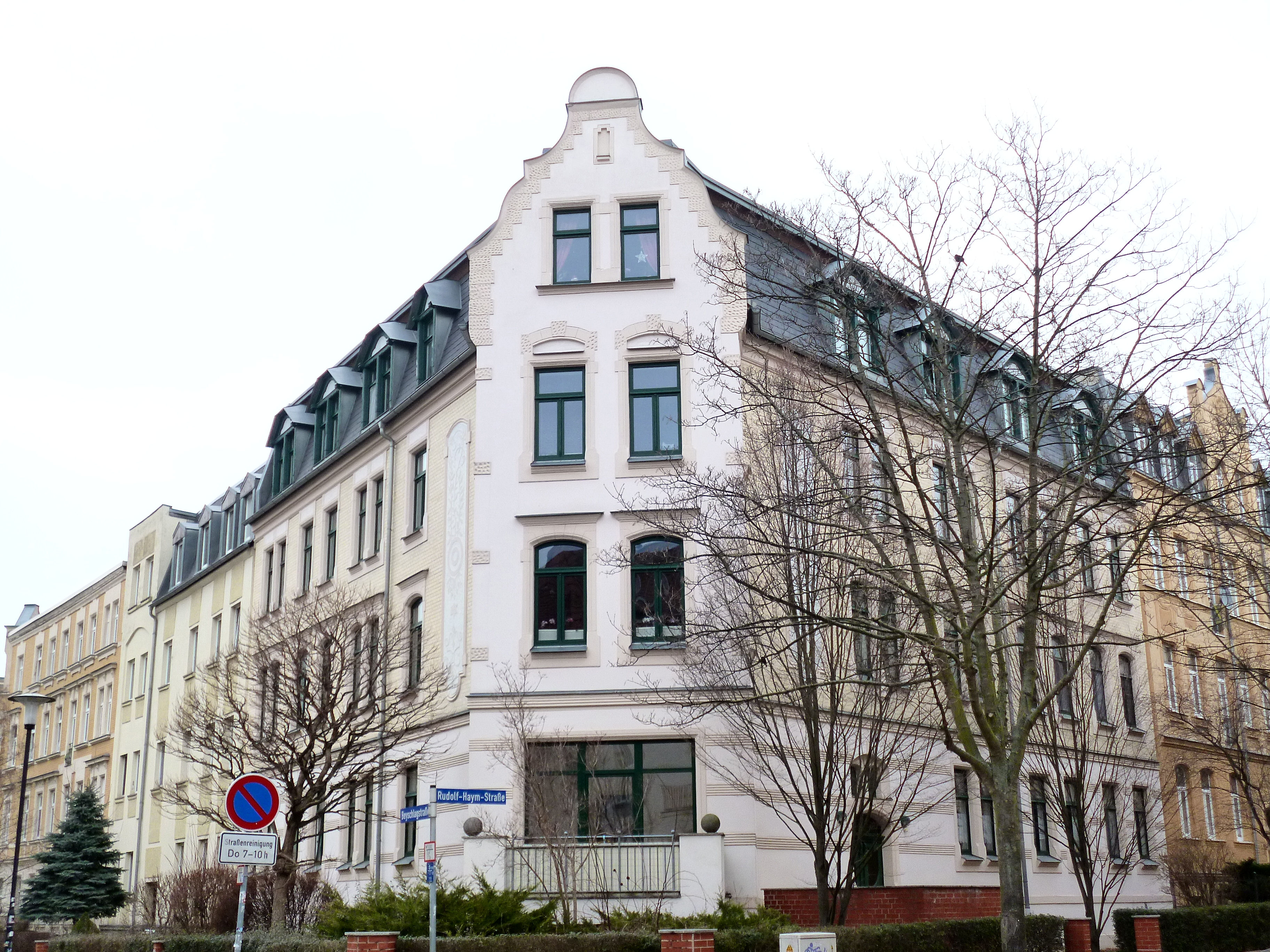 Rudolf-Haym-Straße 27, Halle (Saale)